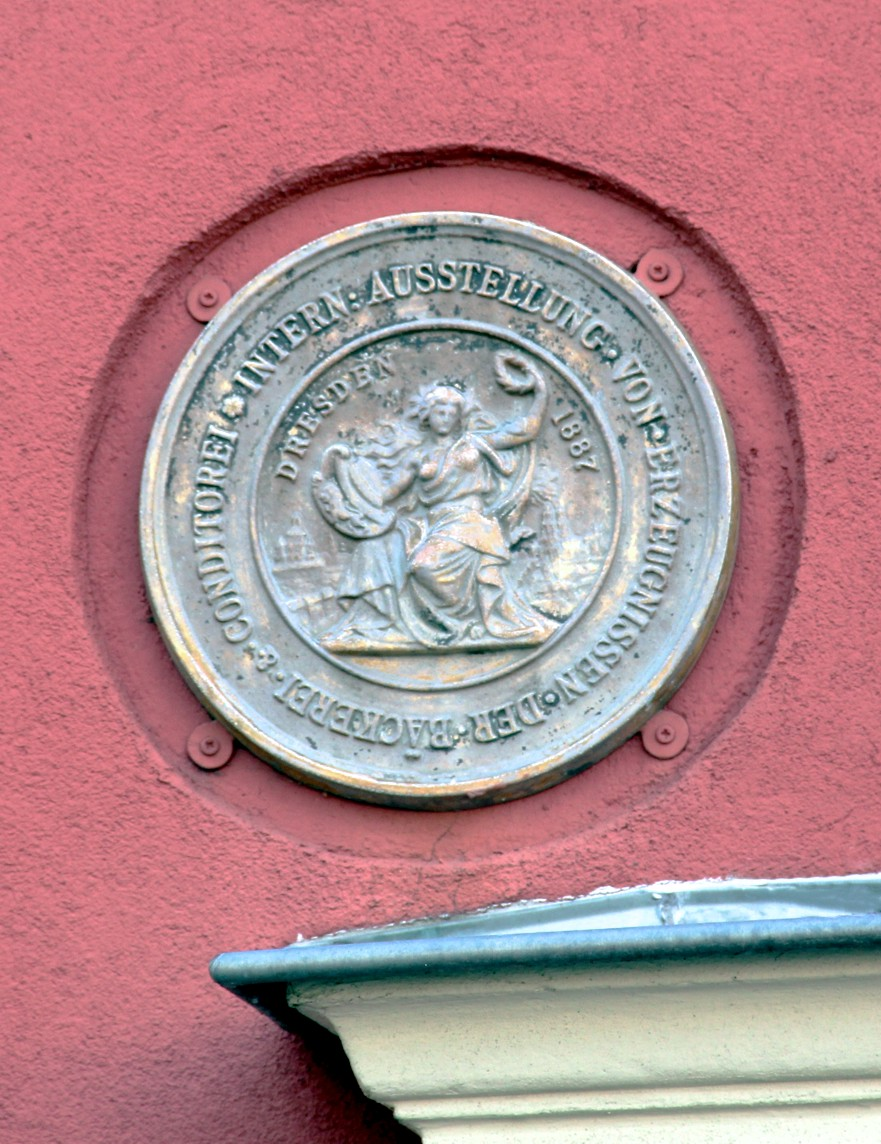 Nachbildung einer historichen Preismedaille am Gebäude der ehemaligen Pfefferküchlerei von G. T. Thomas in Pulsnitz